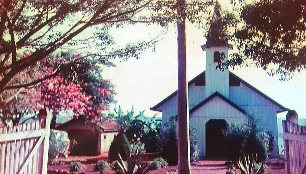 Igreja da Colônia de Holandeses de Monte Alegre, em Telêmaco Borba, no Paraná.